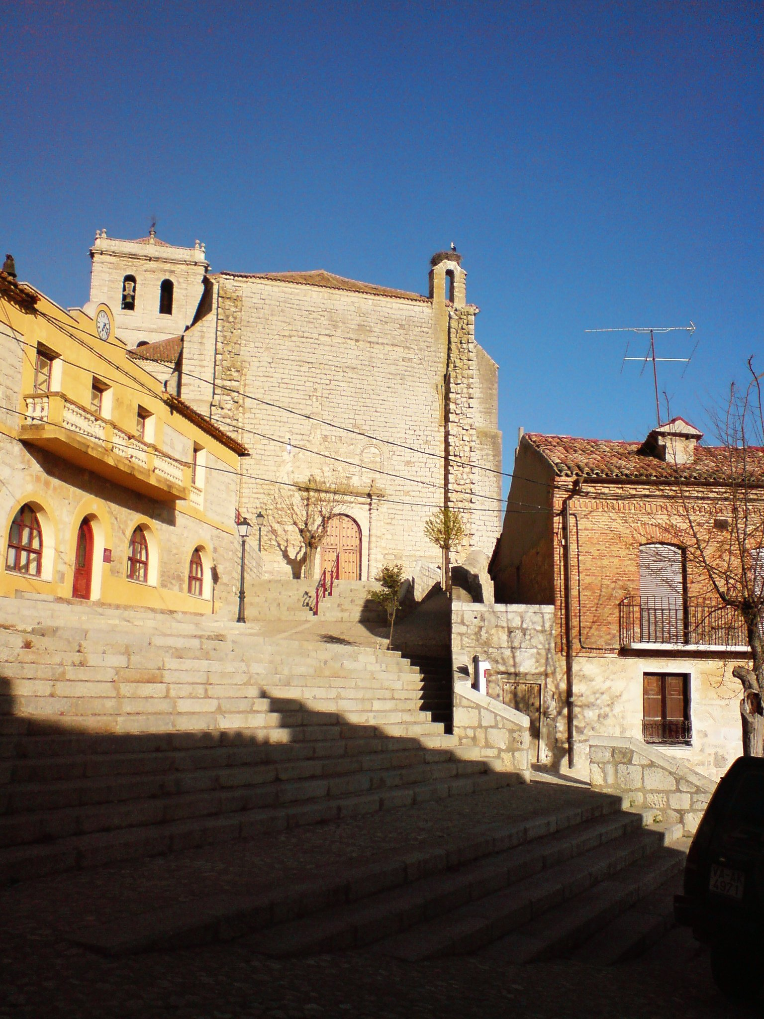 Iglesia Parroquial de San Pedro Apostol (Mucientes)